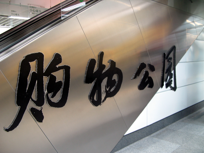 ShenZhen Metro Gou Wu Gong Yuan Ident